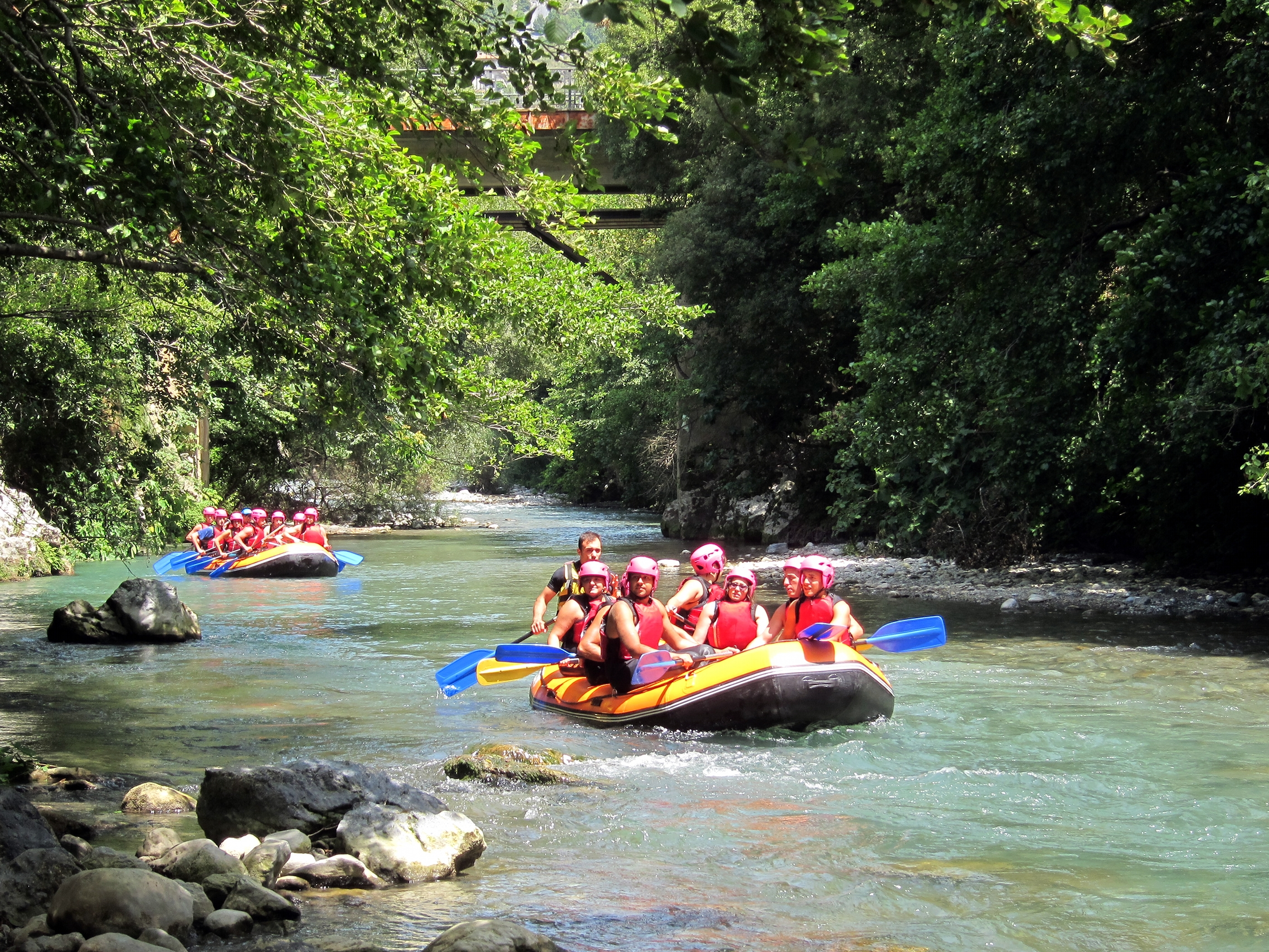 Rafting sur le Lao près de Papasidero.